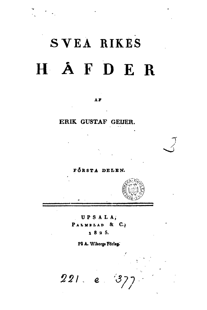 Title page of Svea rikes Häfder by Erik Gustaf Geijer